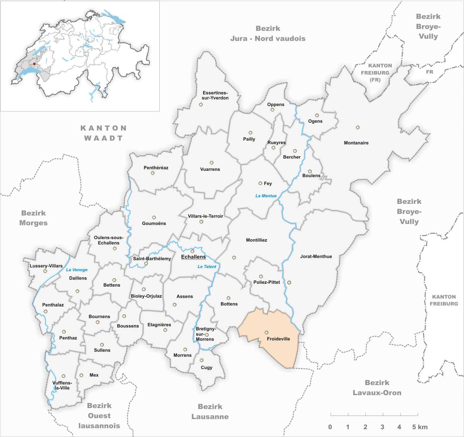 Municipality Froideville